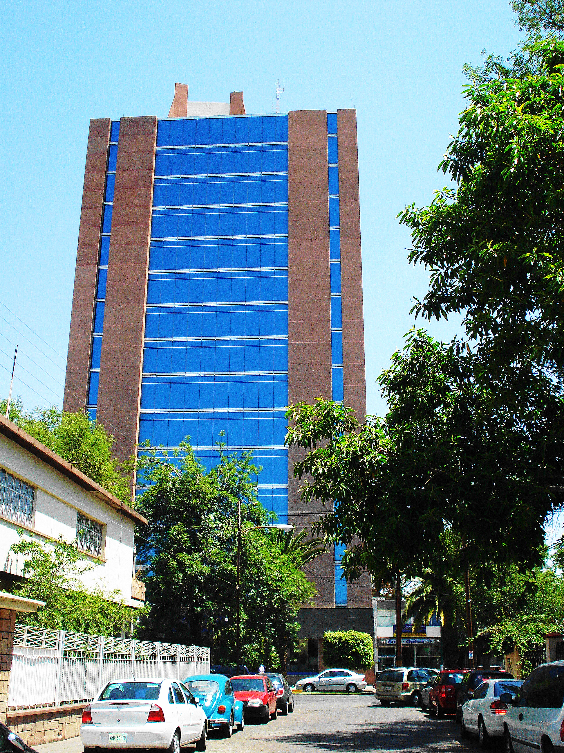 Torre Inegi en la ciudad de San Luis Potosi, Mexico.